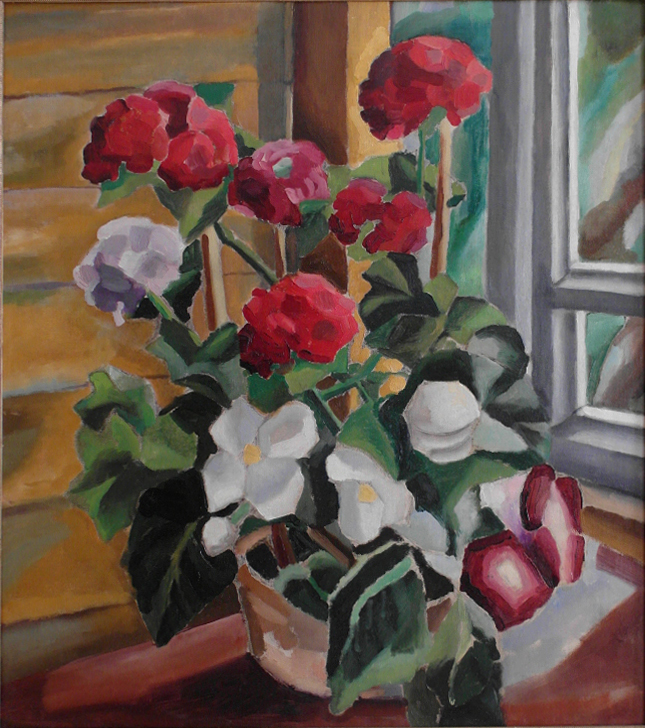 Гарри Блюмендельд, натюрморт «Гортензии»